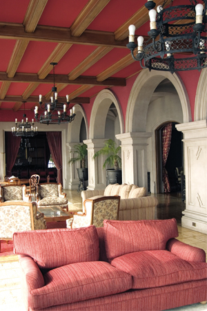 Pasillo interior del Palacio de Cerro Castillo, Viña del Mar, Chile